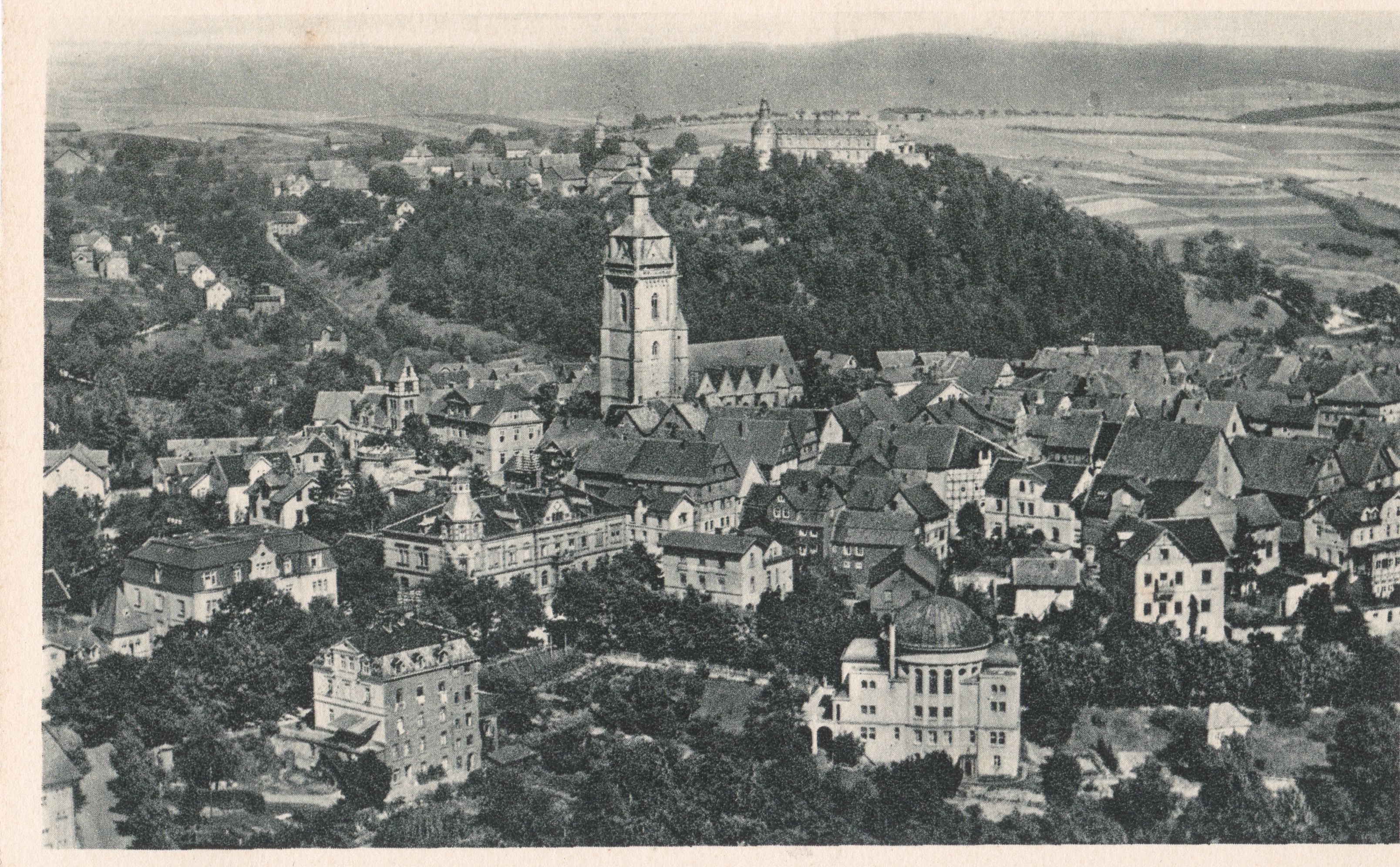 Bad Wildungen: Ansicht der Altstadt von Südsüdwesten mit Synagoge (vorn rechts), Stadtkirche (Mitte) und Schloss (hinten), um 1925